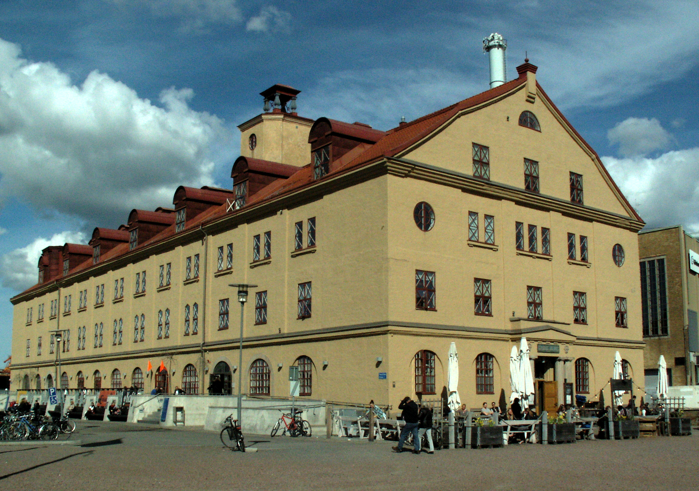 Lagerhuset, Göteborg, södra gaveln och västra långsidan.